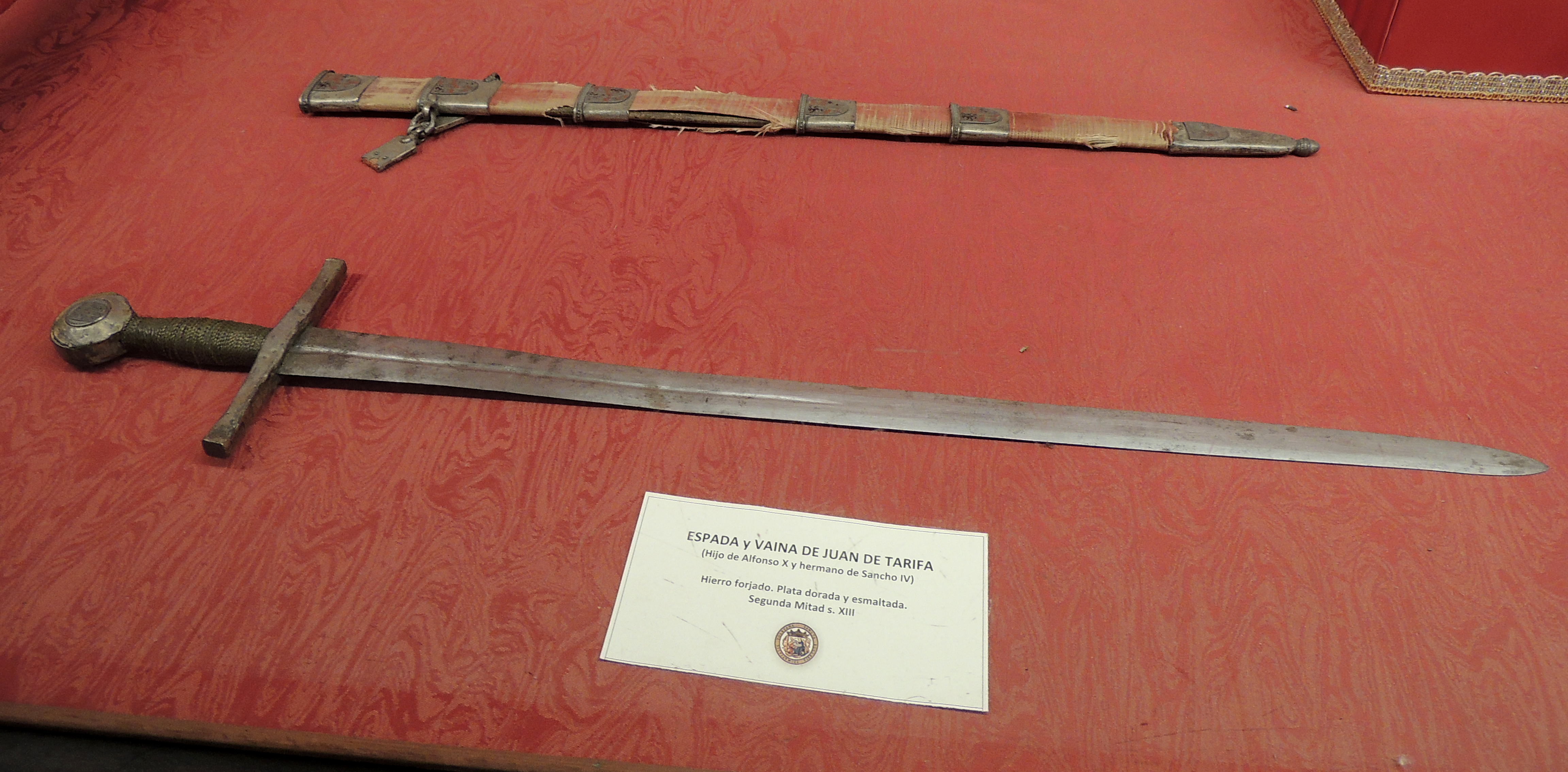 Espada, con su vaina correspondiente, del infante Juan de Castilla el de Tarifa (1262-1319), que murió Desastre de la Vega de Granada, acaecido en 1319, y era hijo del rey Alfonso X de Castilla y de la reina Violante de Aragón. La espada y la vaina se encuentran en una vitrina de la sacristía de la catedral de Toledo, (España).